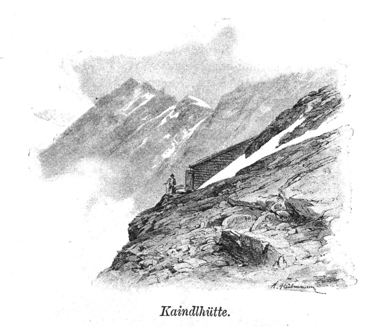 Kaindlhütte aus Zeitschrift des Deutschen und Oesterreichischen Alpenvereins 1894 Band 25